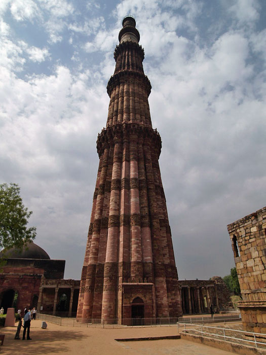 Qutb-Minar, New Delhi